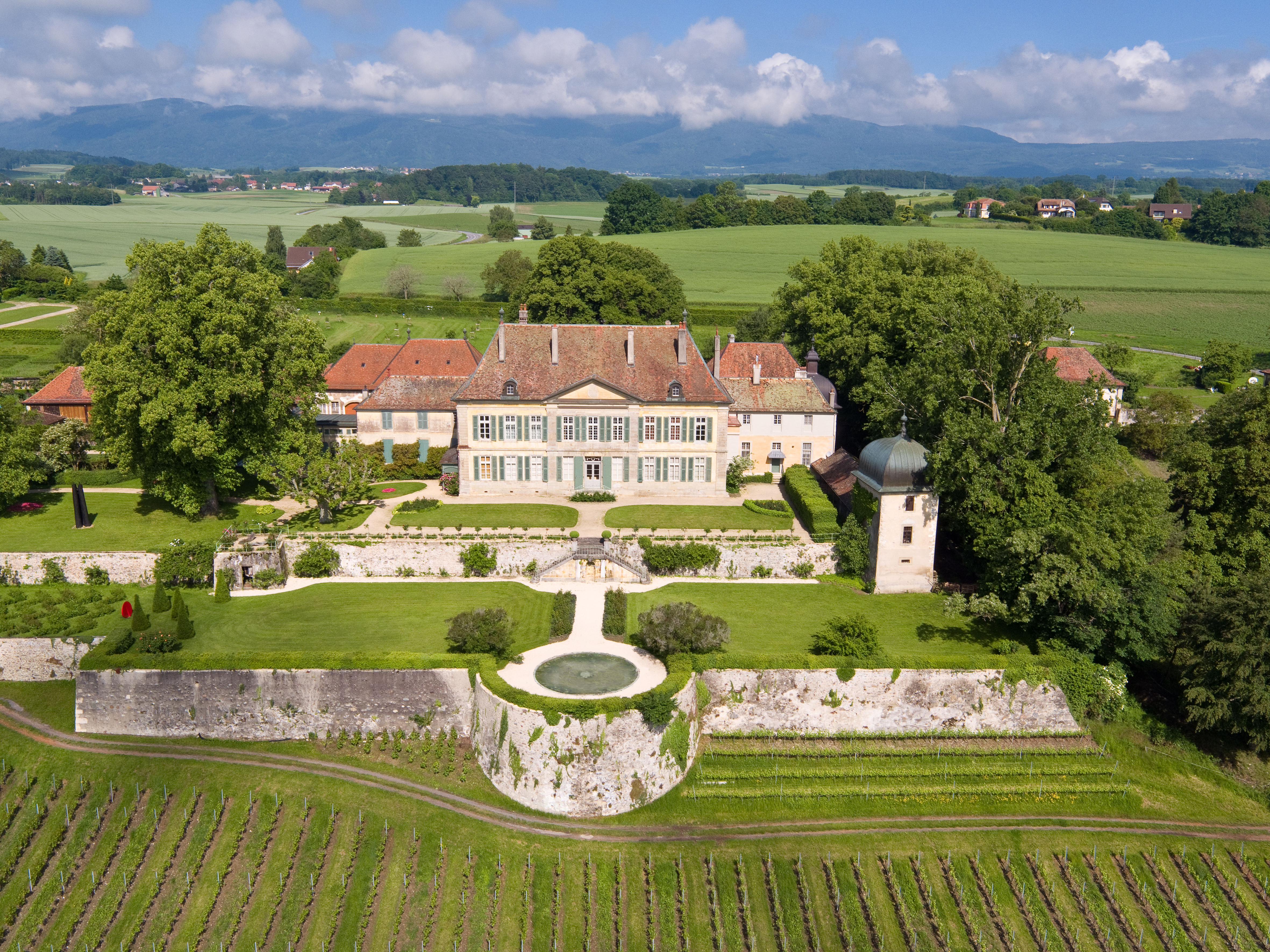 Le Château de Vullierens actuel